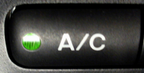 Klimaanlagenschalter